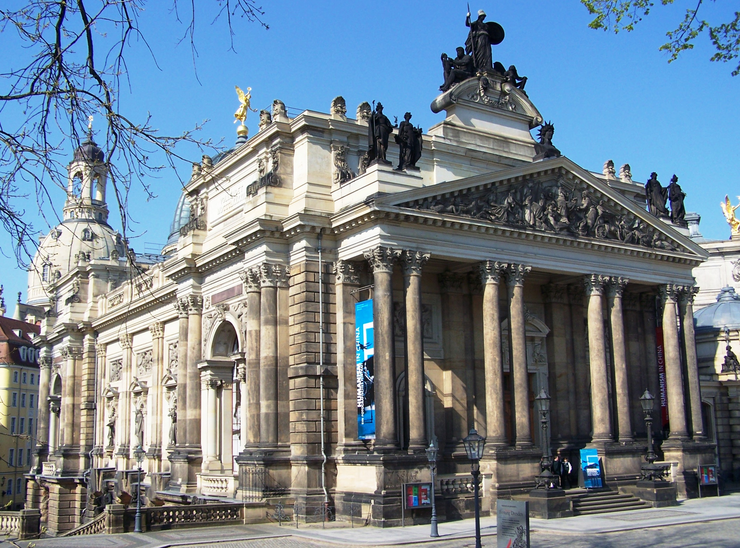 Portal der Kunstakademie auf der Brühlschen Terrasse